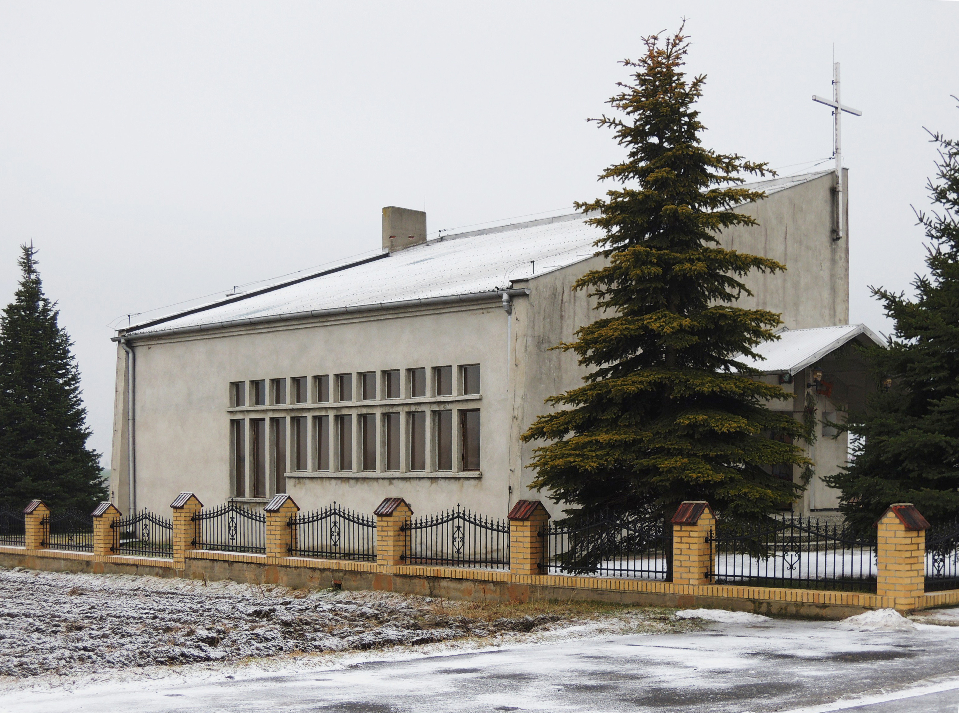 Ludwinów, kaplica św. Józefa